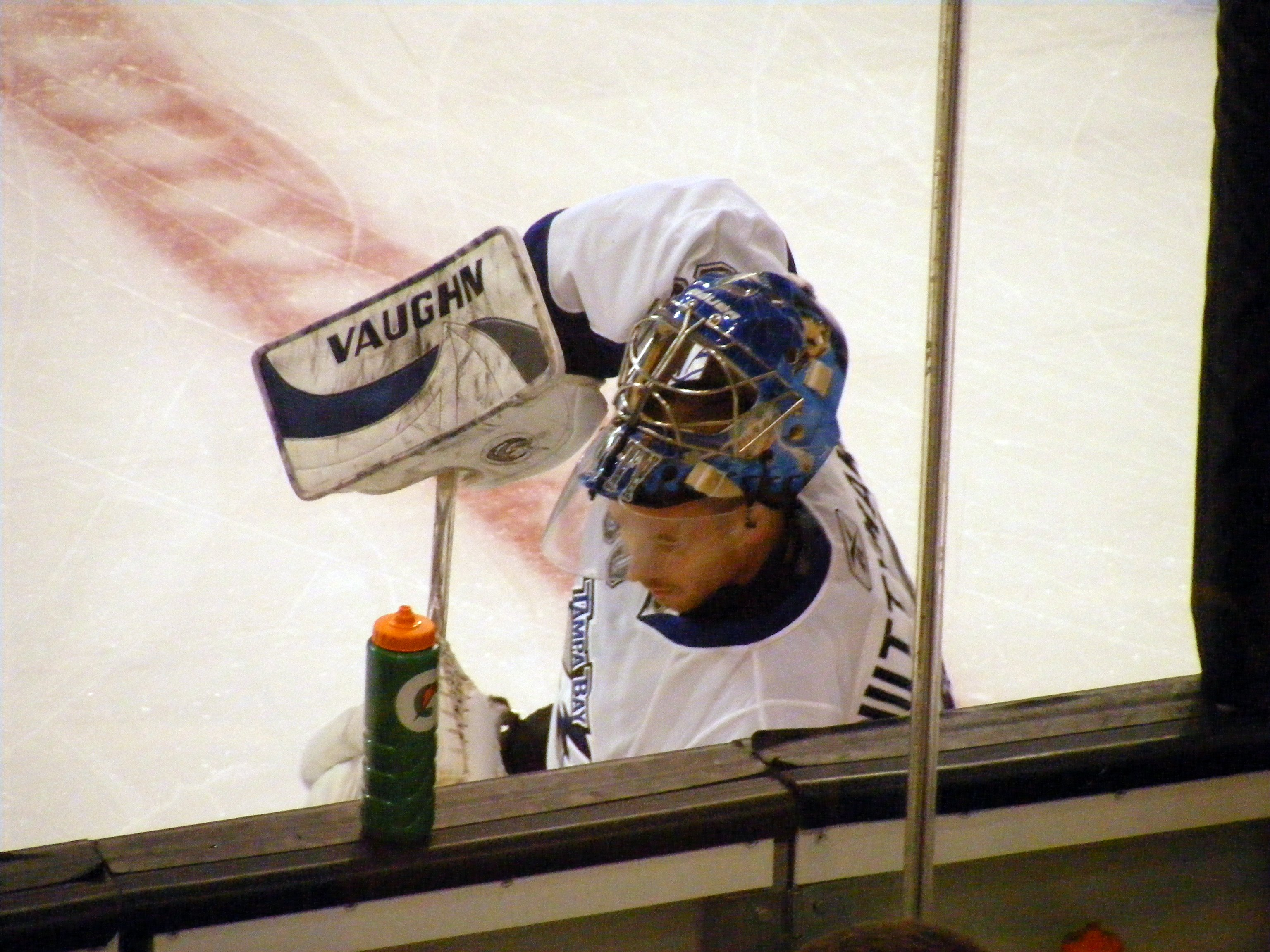 Finnish goalkeeper Antero Niittymäki